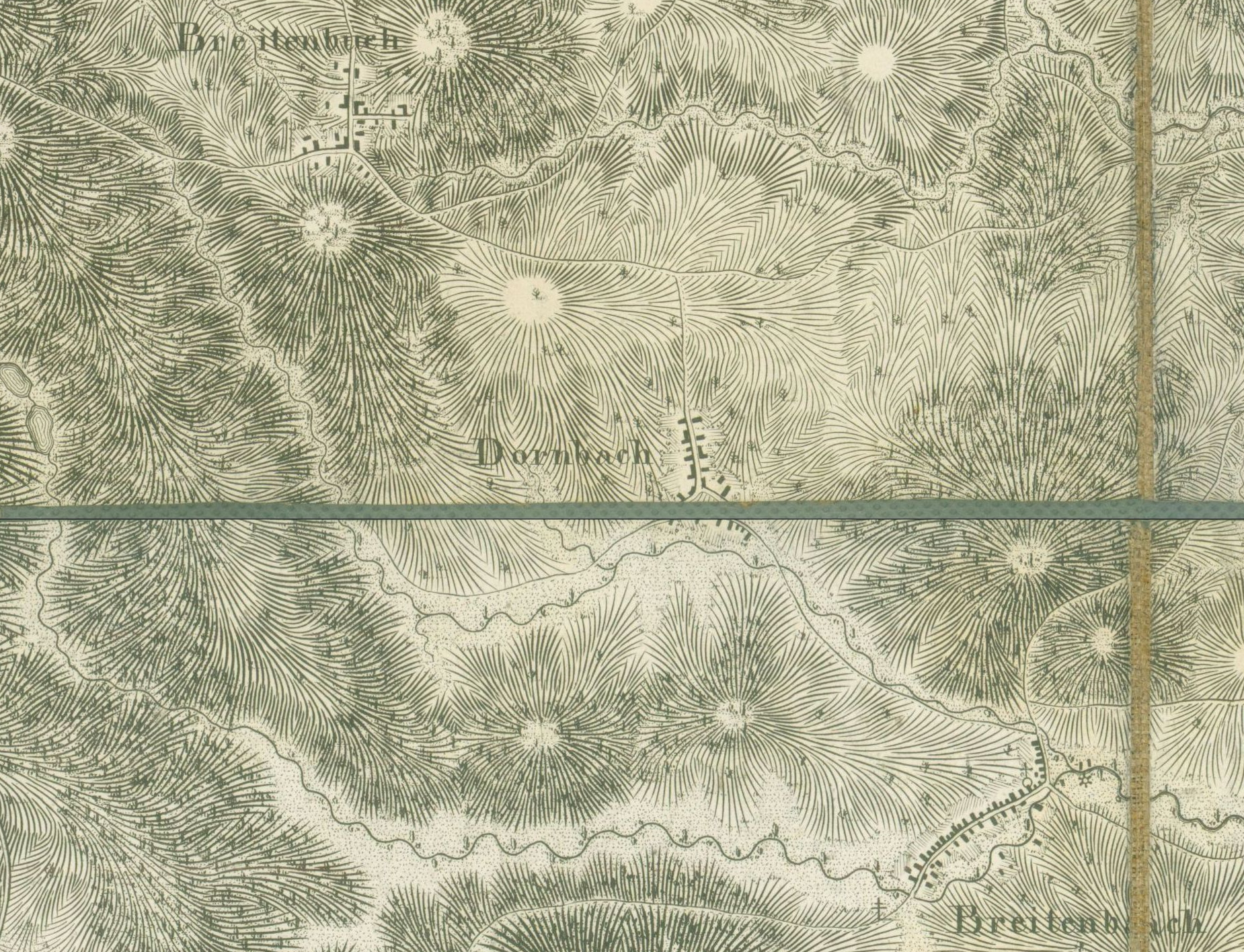 Montage und anschließender Zuschnitt aus Blatt 20 und 16 der Haas´schen Karte mit Dörnbach (Kirchzell). ACHTUNG die Karte muss etwa 30° im Uhrzeigersinn gedreht werden, damit Norden oben ist.